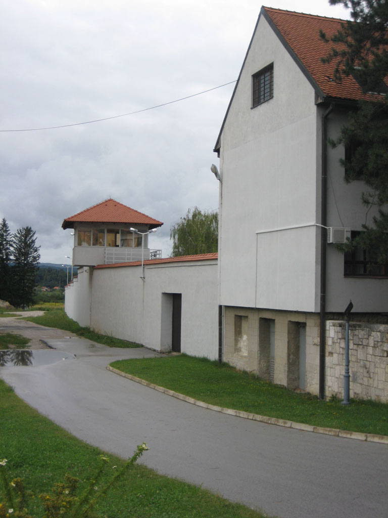 Kaznionica u Lepoglavi